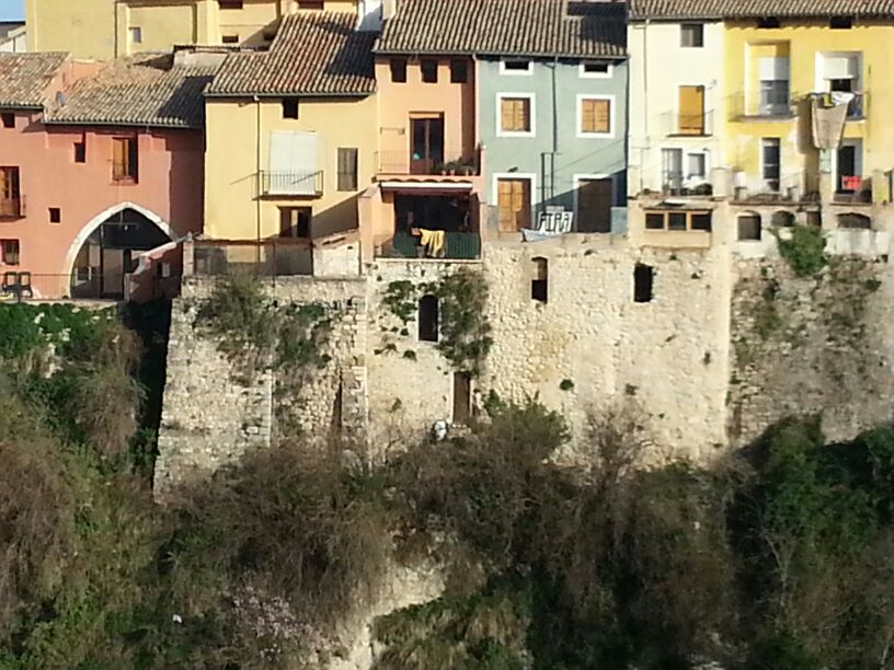 Muralla vista 1